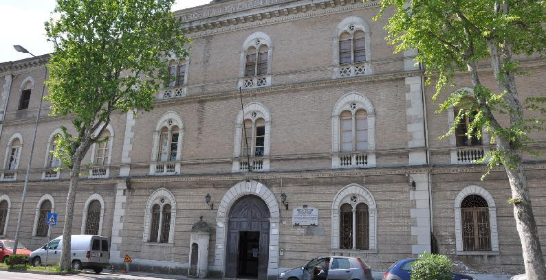 Caserma Generale Paolini a Fano, facciata esterna.